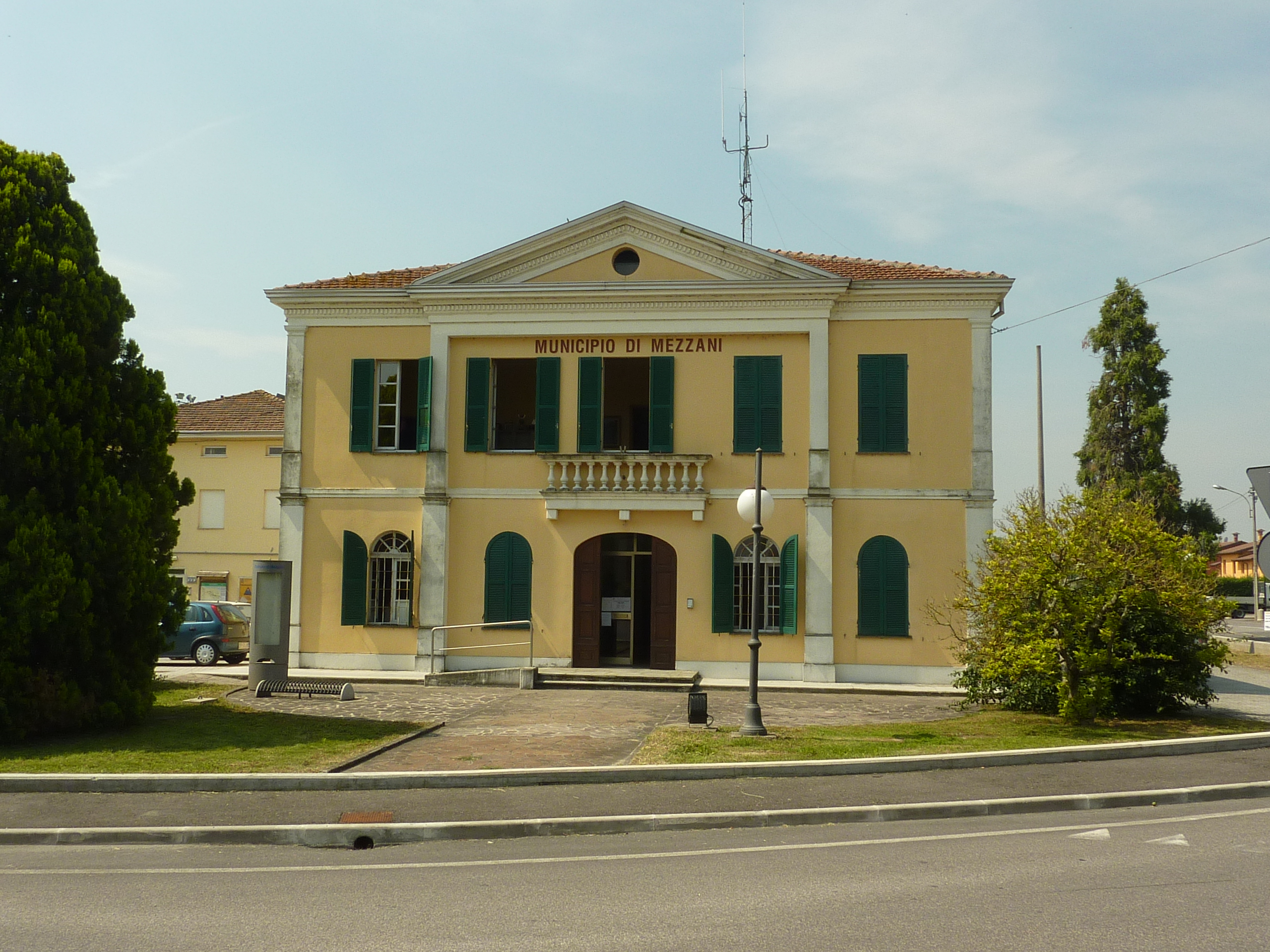 Il municipio del comune di Mezzani (Parma).